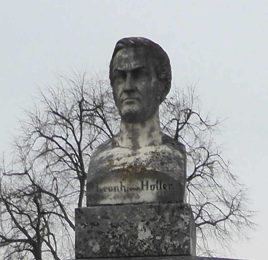 Friedhofskapelle (Wolfsbach)-Leonhard von Holler